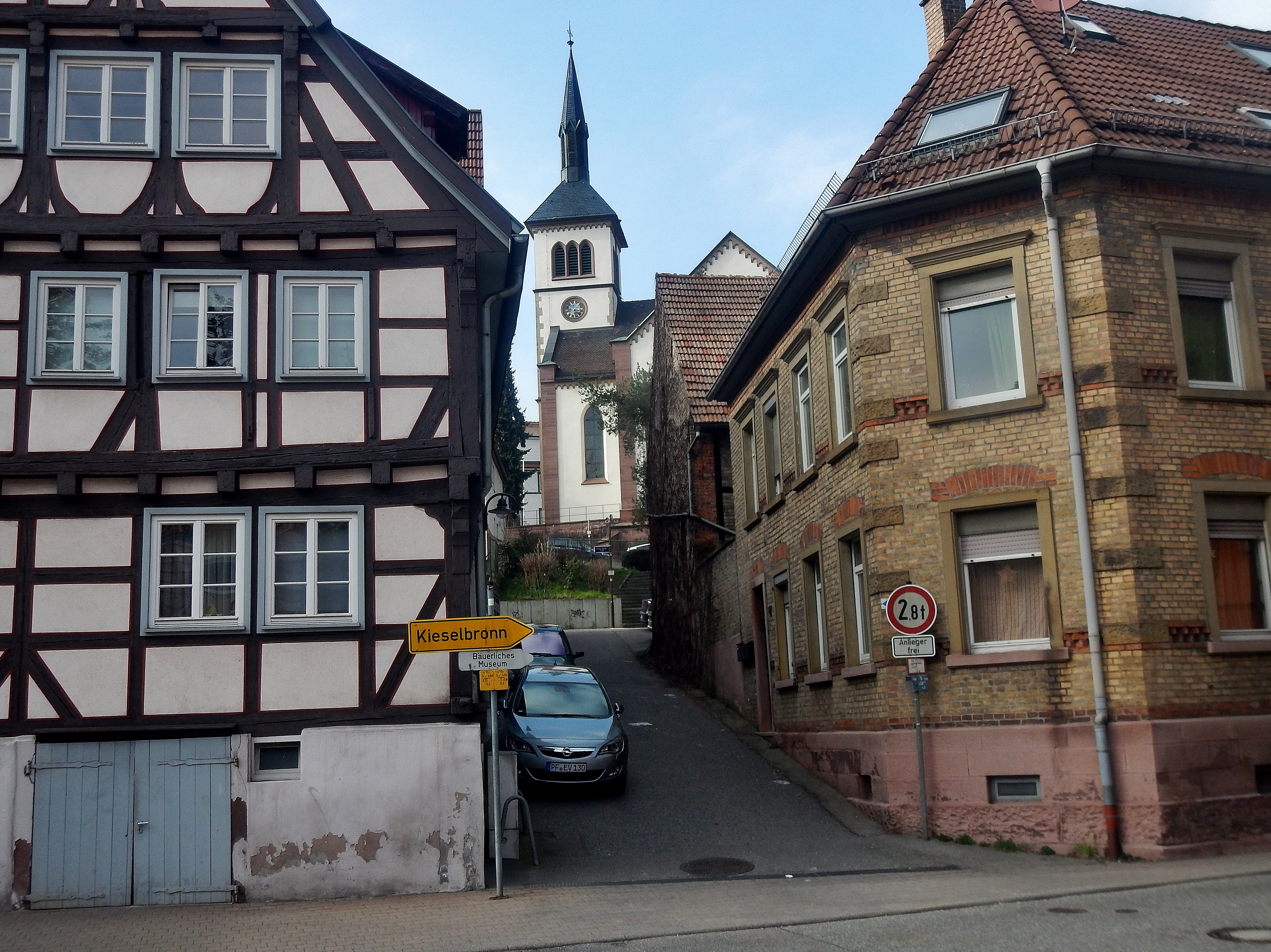 Eutingen an der Enz mit Blick auf die evangelische Kirche